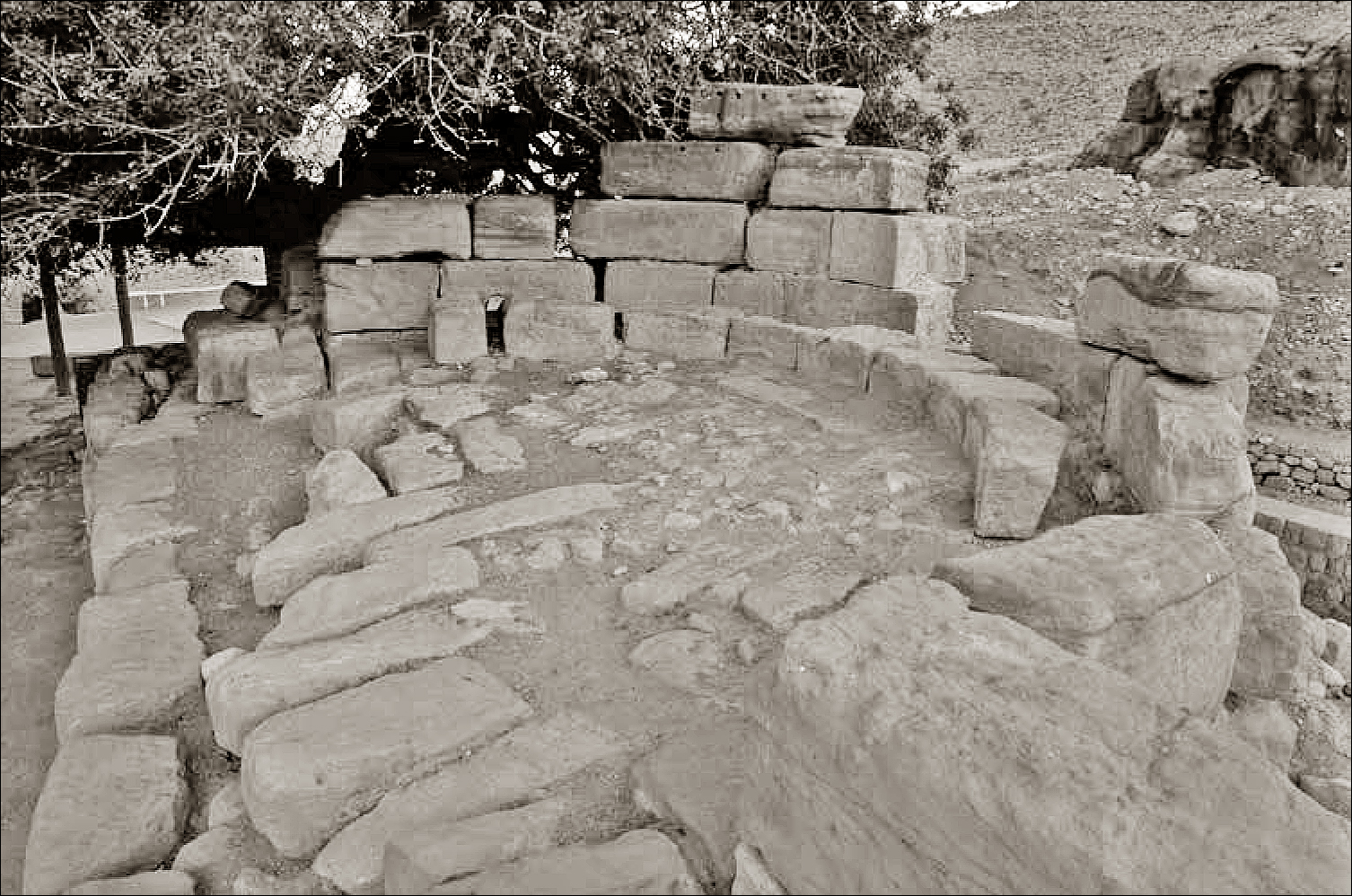 Vestiges d'un Nymphée du sanctuaire du Qasr al-Bint à. Petra.